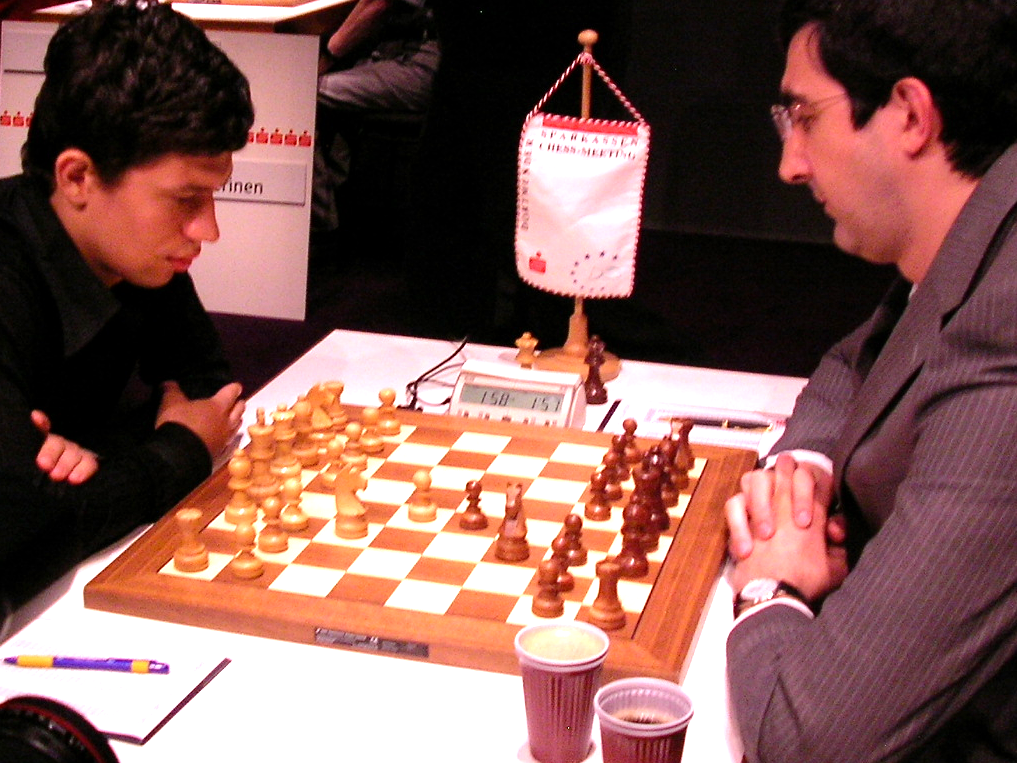 Jewgeni Alexejew - Wladimir Kramnik, Dortmunder Schachtage 2007.